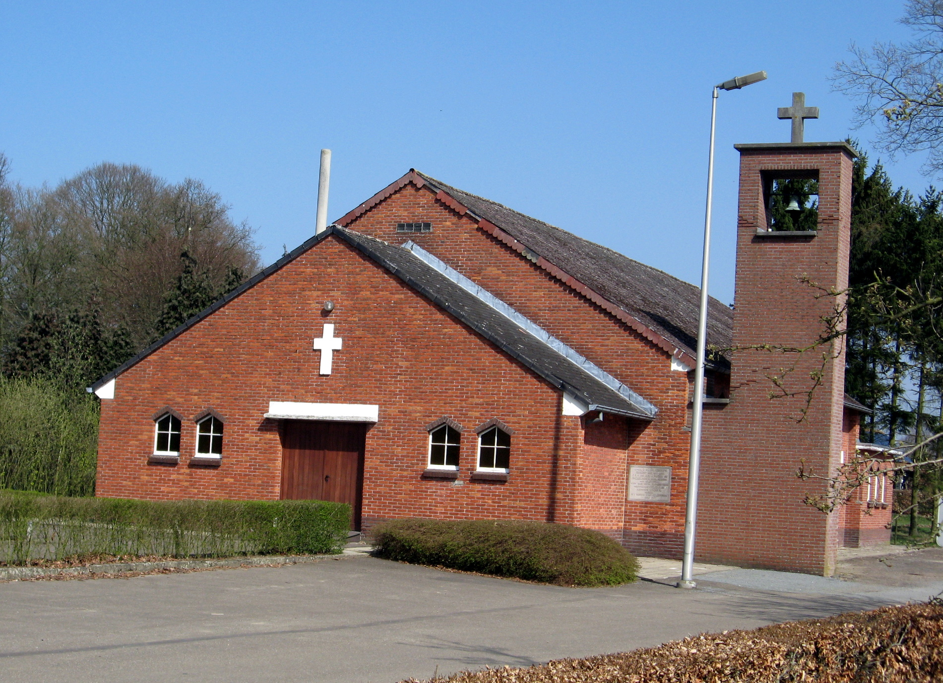 Kapel van het gehucht Sonnis of Sint-Jan-Berchmanskerkje in Helchteren